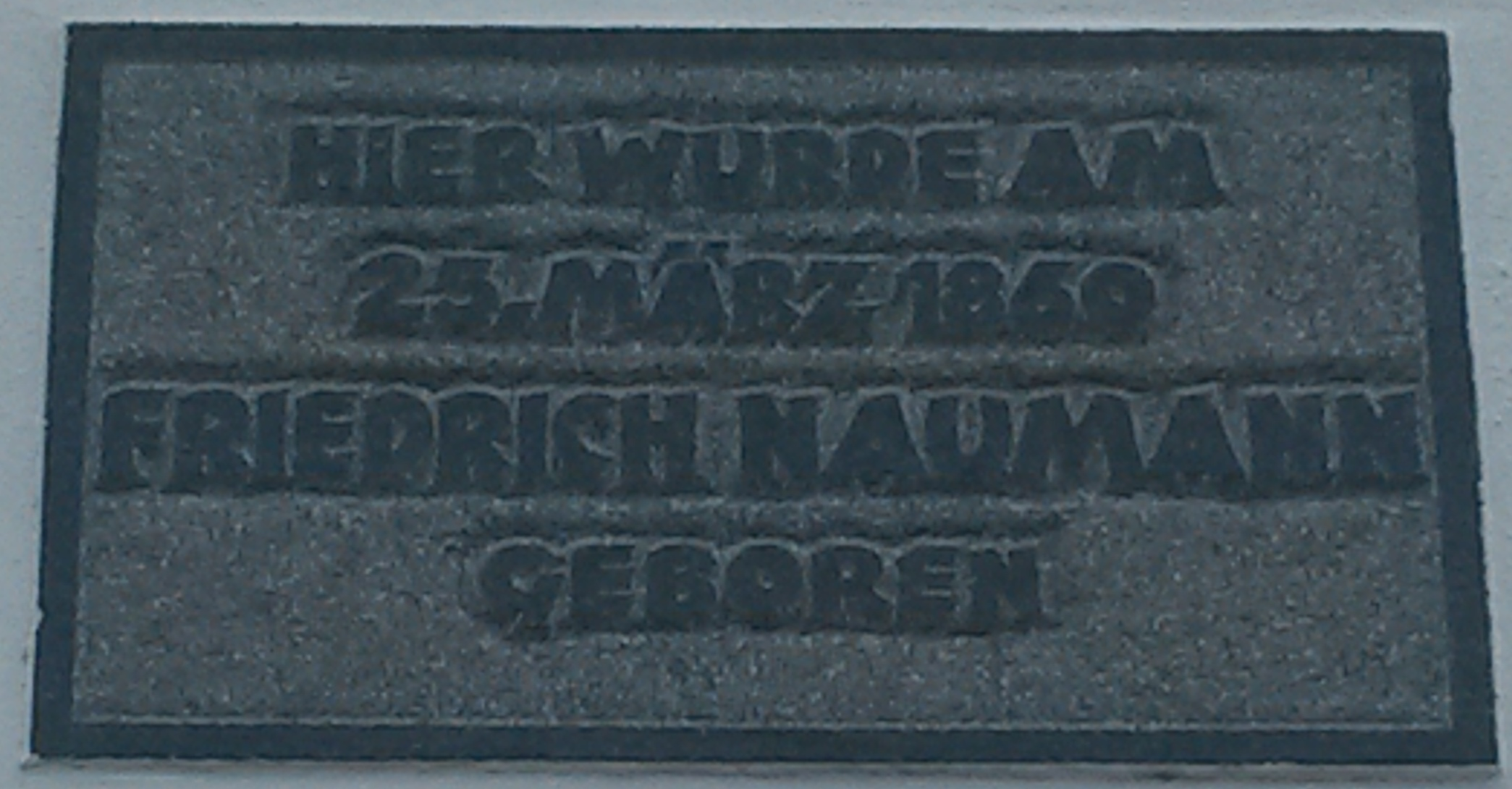 Naumann-Tafel am Geburtshaus in Störmthal